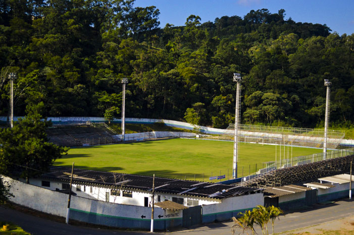 Estádio Municipal Euclides de Almeida